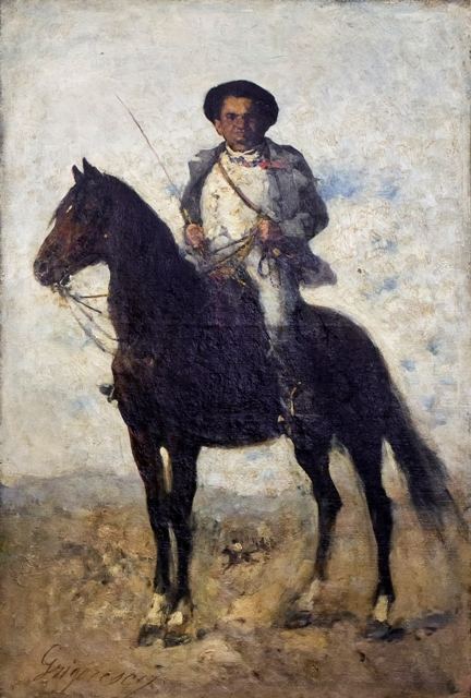 Vechilul cunoscut și ca Portretul d-ului Atanasiade sau Judecătorul - Muzeul de Artă din Cluj